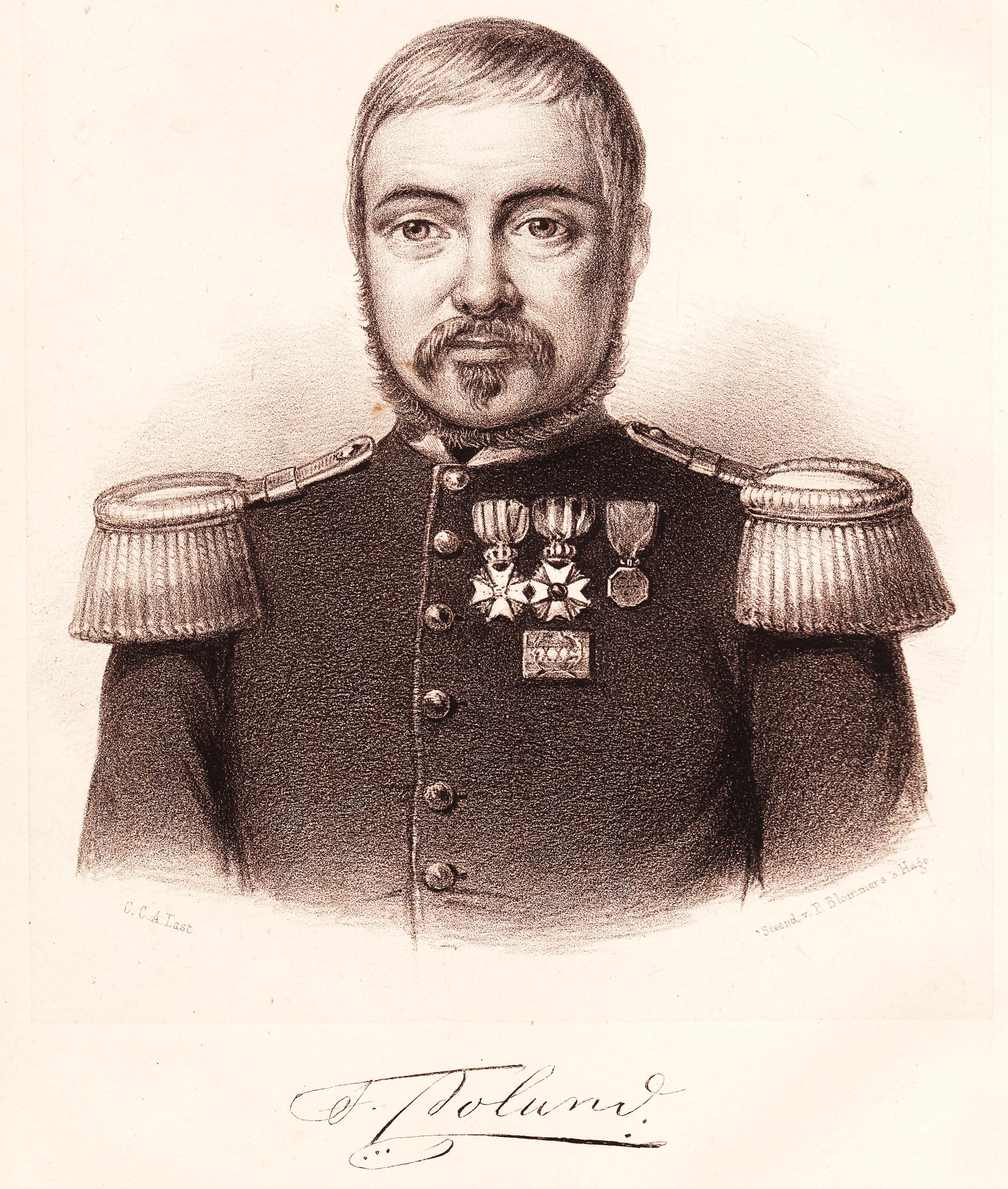 Toontje Poland